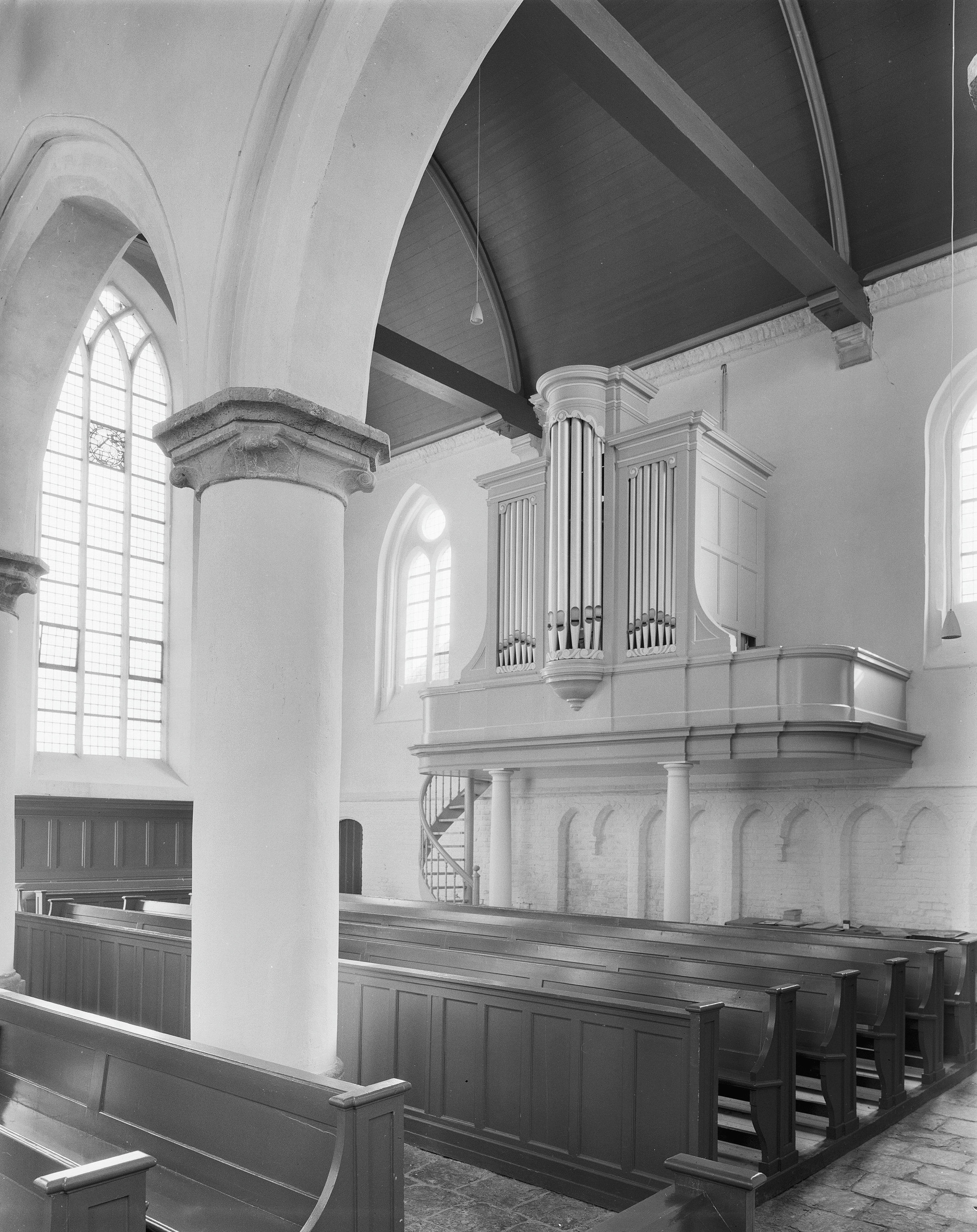 Nederlands Hervormde Kerk: interieur naar het zuid-oosten